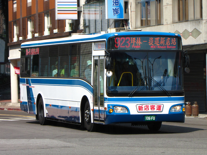 新店客運日野RK8JRSA大客車106-FU，行駛新北市市區公車923線。